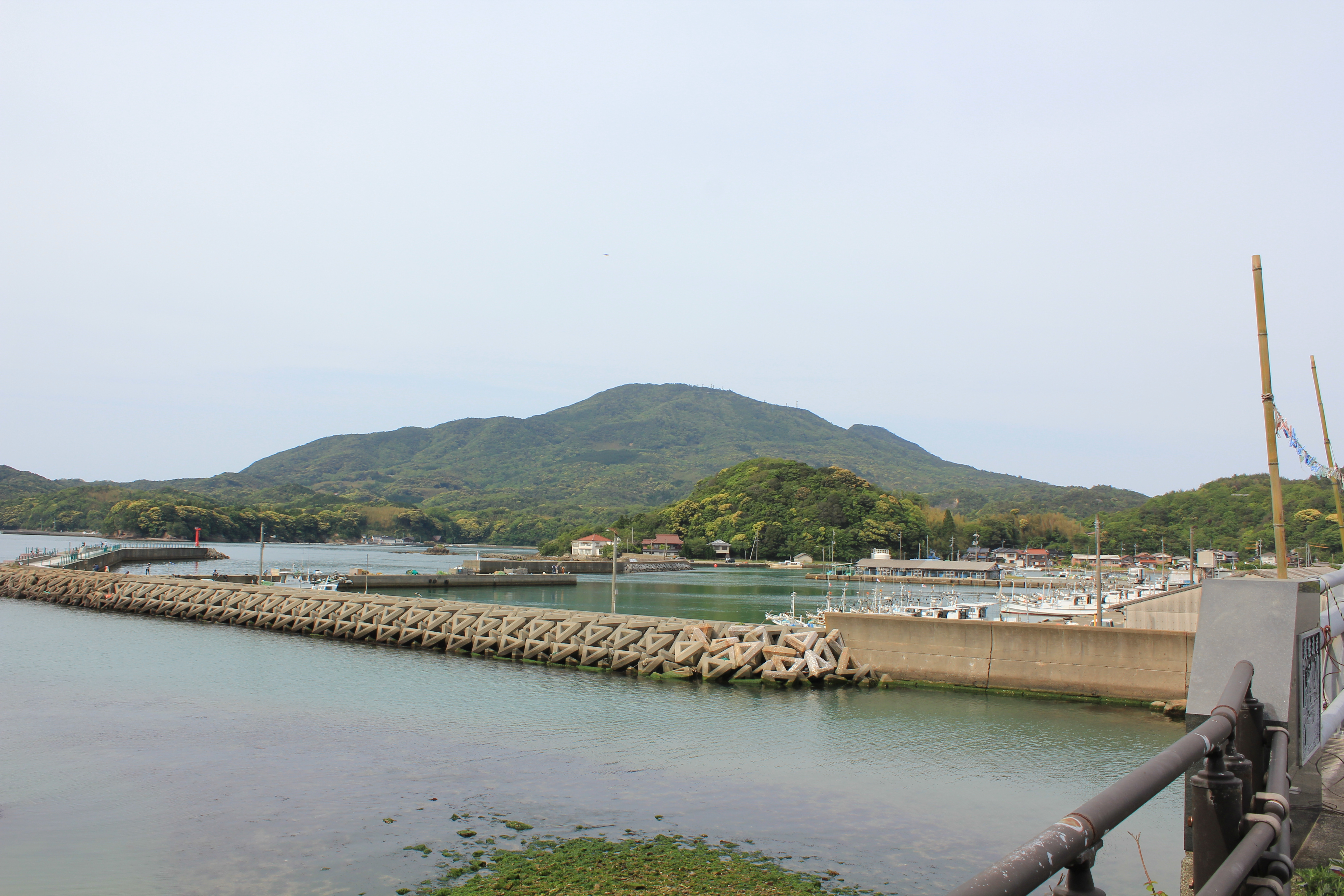 山口県萩市須佐の高山（こうやま）。ファイル名には阿武火山群とありますが誤認です。